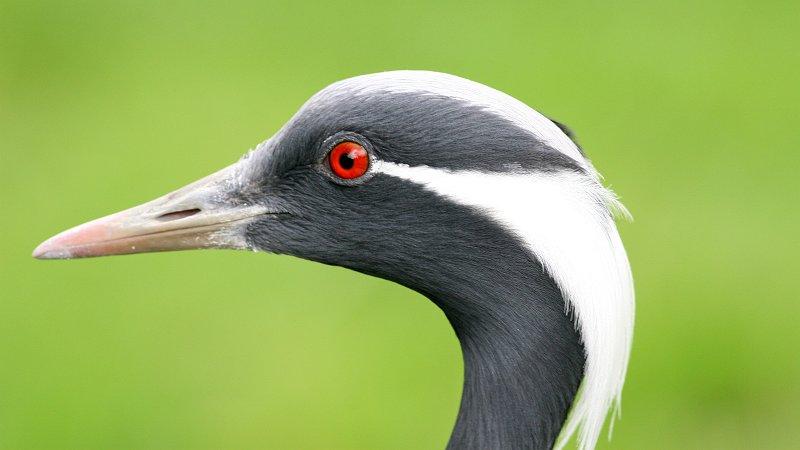 Demoiselle Crane (Anthropoides virgo)